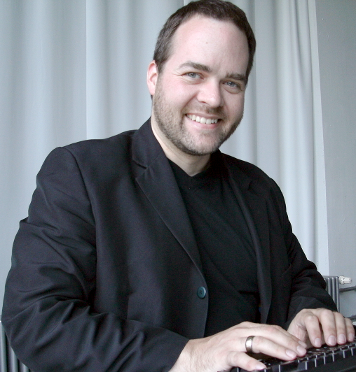 Portraitfoto von Klaus Knopper 2009